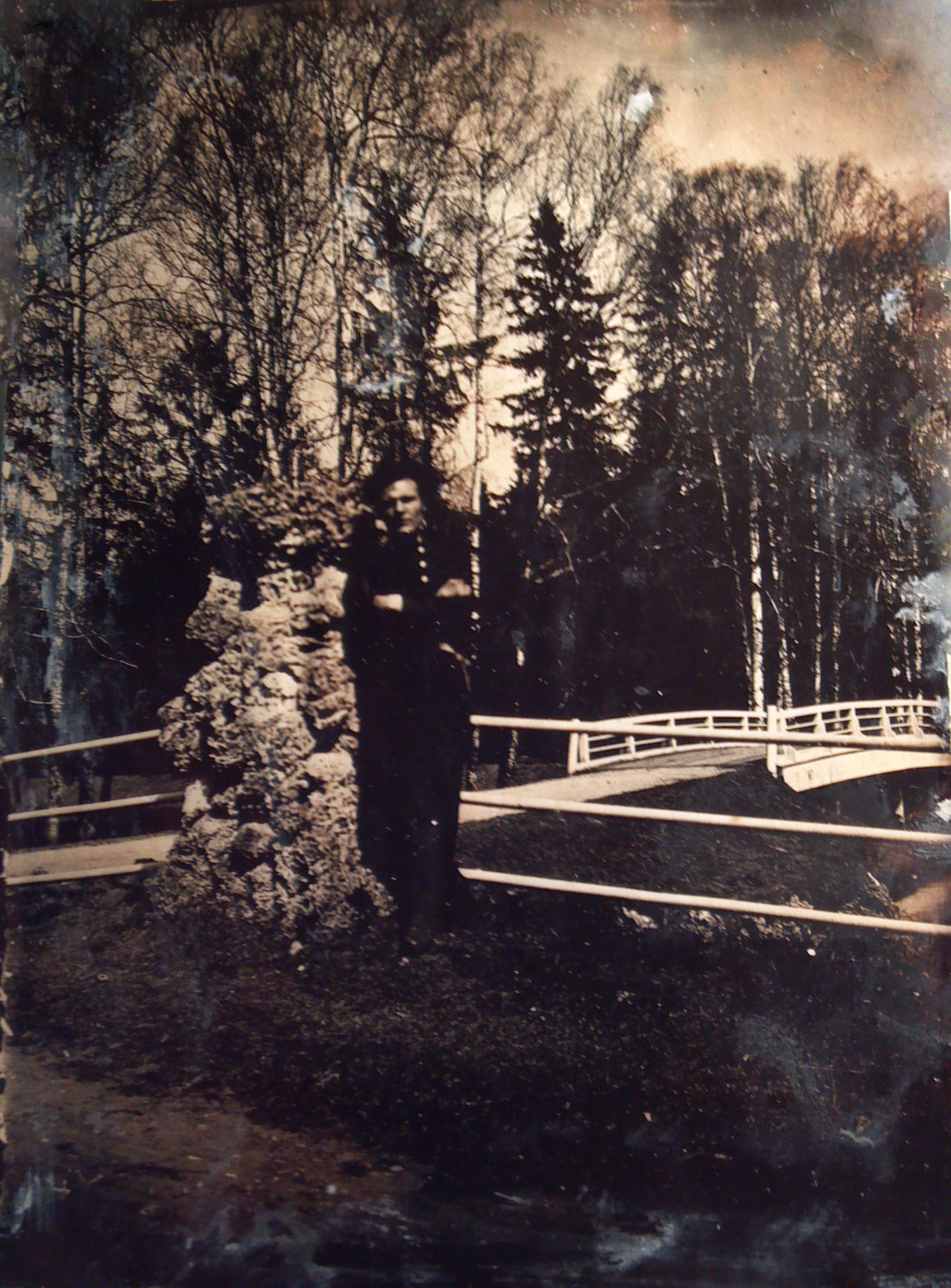 Птичник П.А. Ларионов_Мост Руина